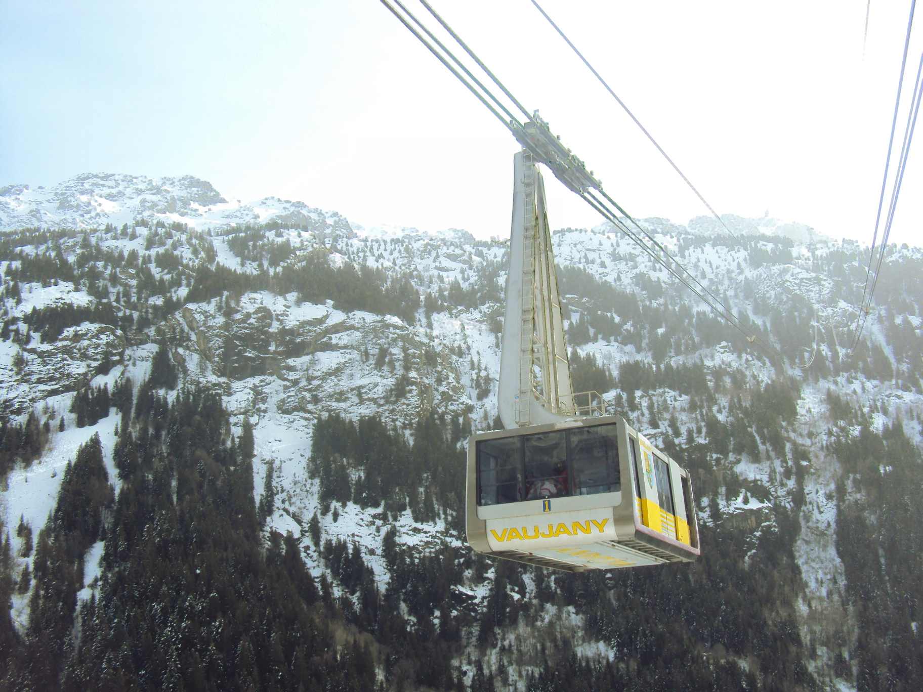 Une cabine du téléphérique du dome des petites rousses, premier tronçon arrive a la station de Vaujany.